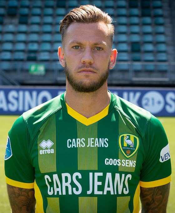 John Goossens